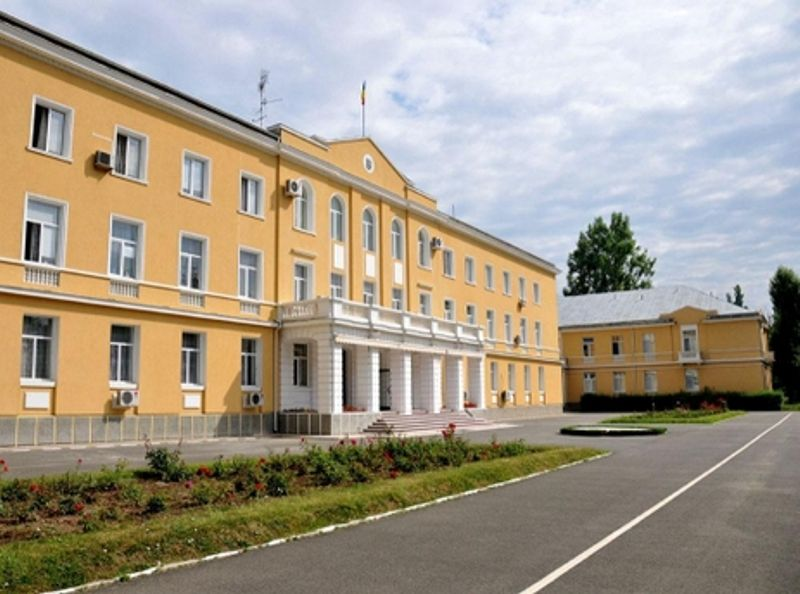 aa